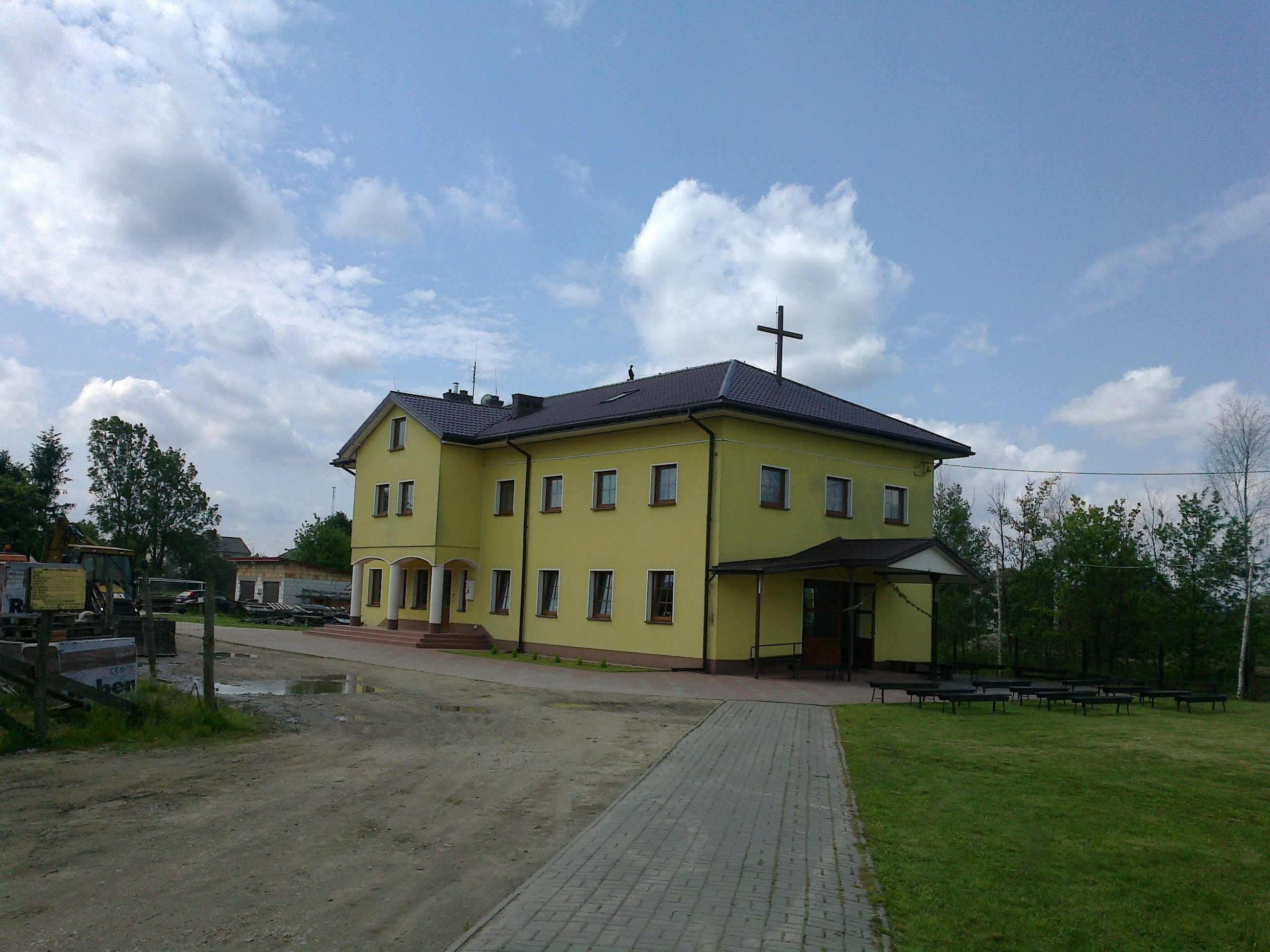 Nadma (woj. mazowieckie, pow. Wołomin, gm. Radzymin) - kościół św. Jana Chrzciciela